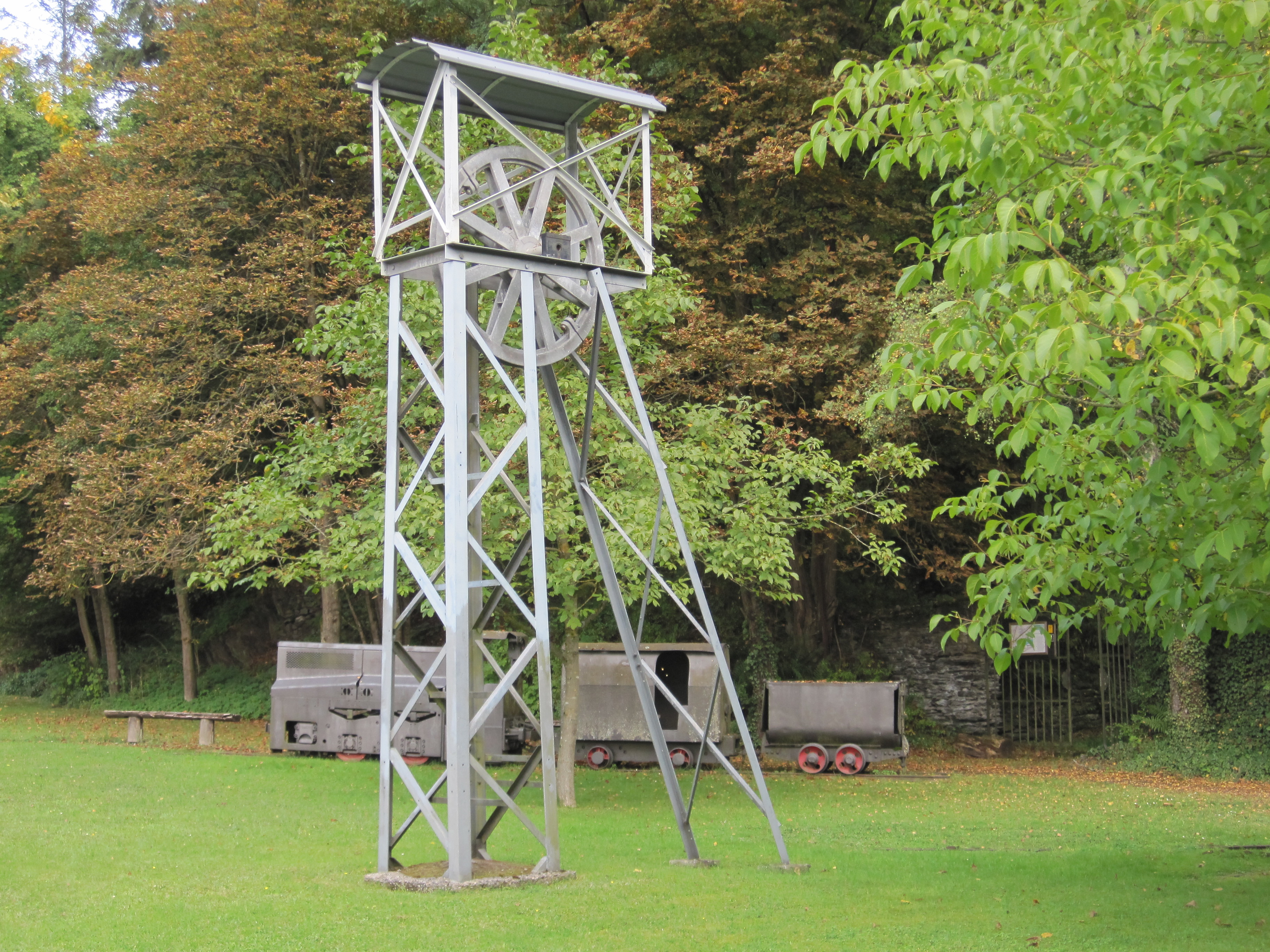 Erinnerungsplatz "Eckmauer" an den Bergbau der Grube Holzappel. Hier: Nachgebauter, verkleinerter Förderturm. Laurenburg, Rhein-Lahn-Kreis